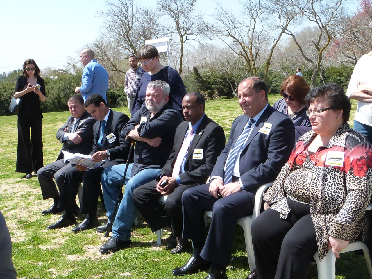 1טקס הענקת המדד החברתי הראשון. מימין לשמאל: מרינה סלודקין, מגלי והבה, שלמה מולה, אילן גילאון, לא ידוע, איתן כבל